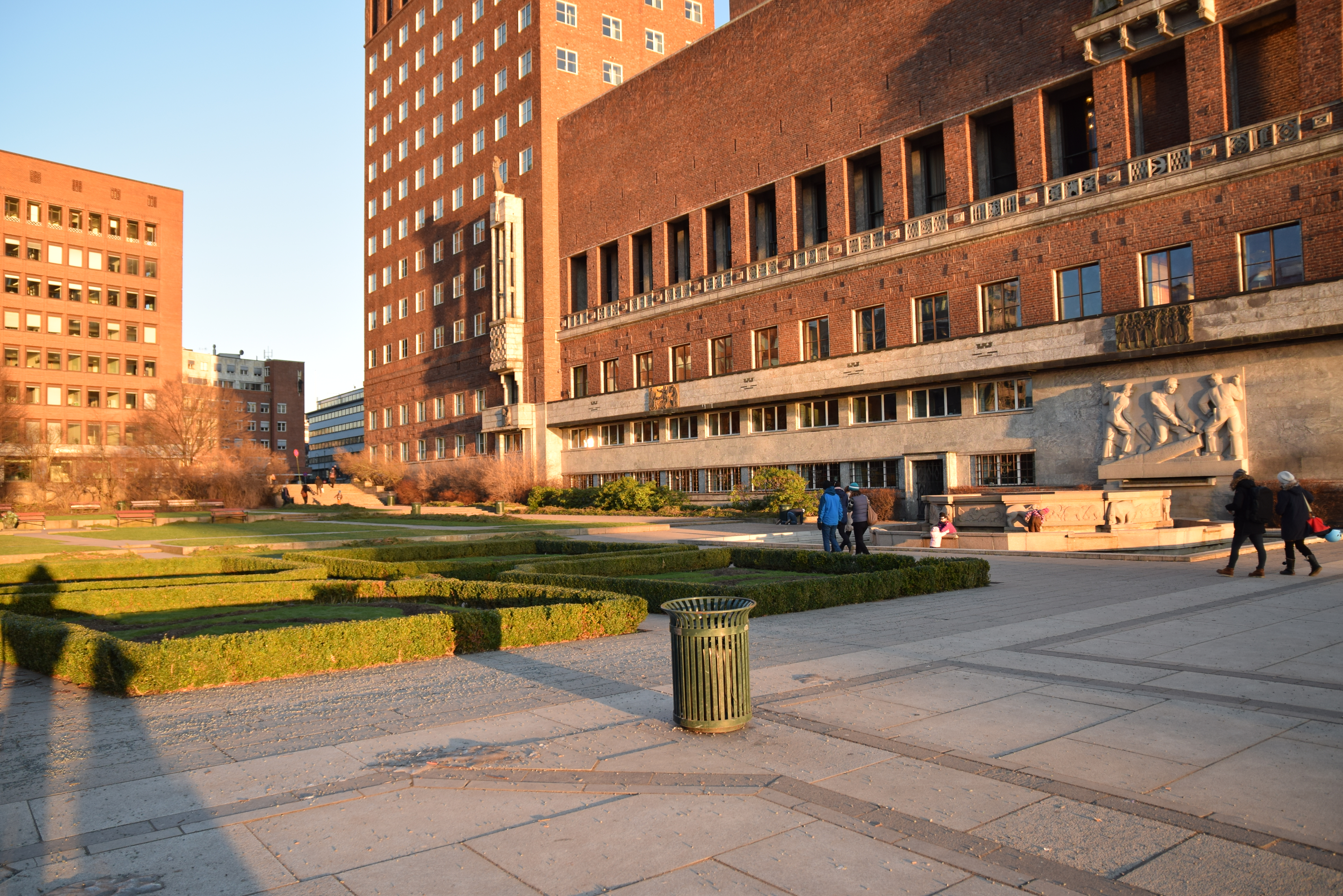 Rådhushagen (Kronprinsesse Märthas plass), Oslo sentrum, med veggen på Oslo rådhus